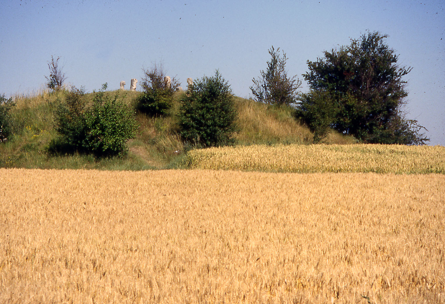 les Bonnettes de Sailly-en-Ostrevent (Pas-de-Calais) .